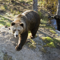 Bjørnen Rugg i Bjørneparken i Flå